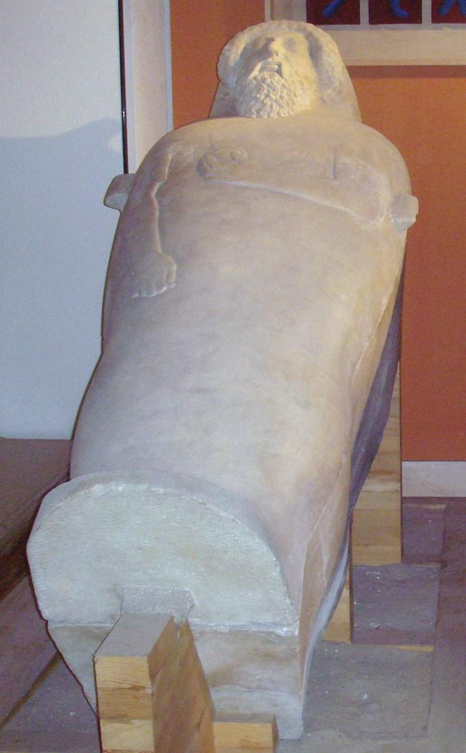 Sarcófago antropoide masculino fenicio de Gades, hallado en 1887 en los astilleros de Cádiz y expuesto en el Museo de Cádiz (España). Siglo V a. C.